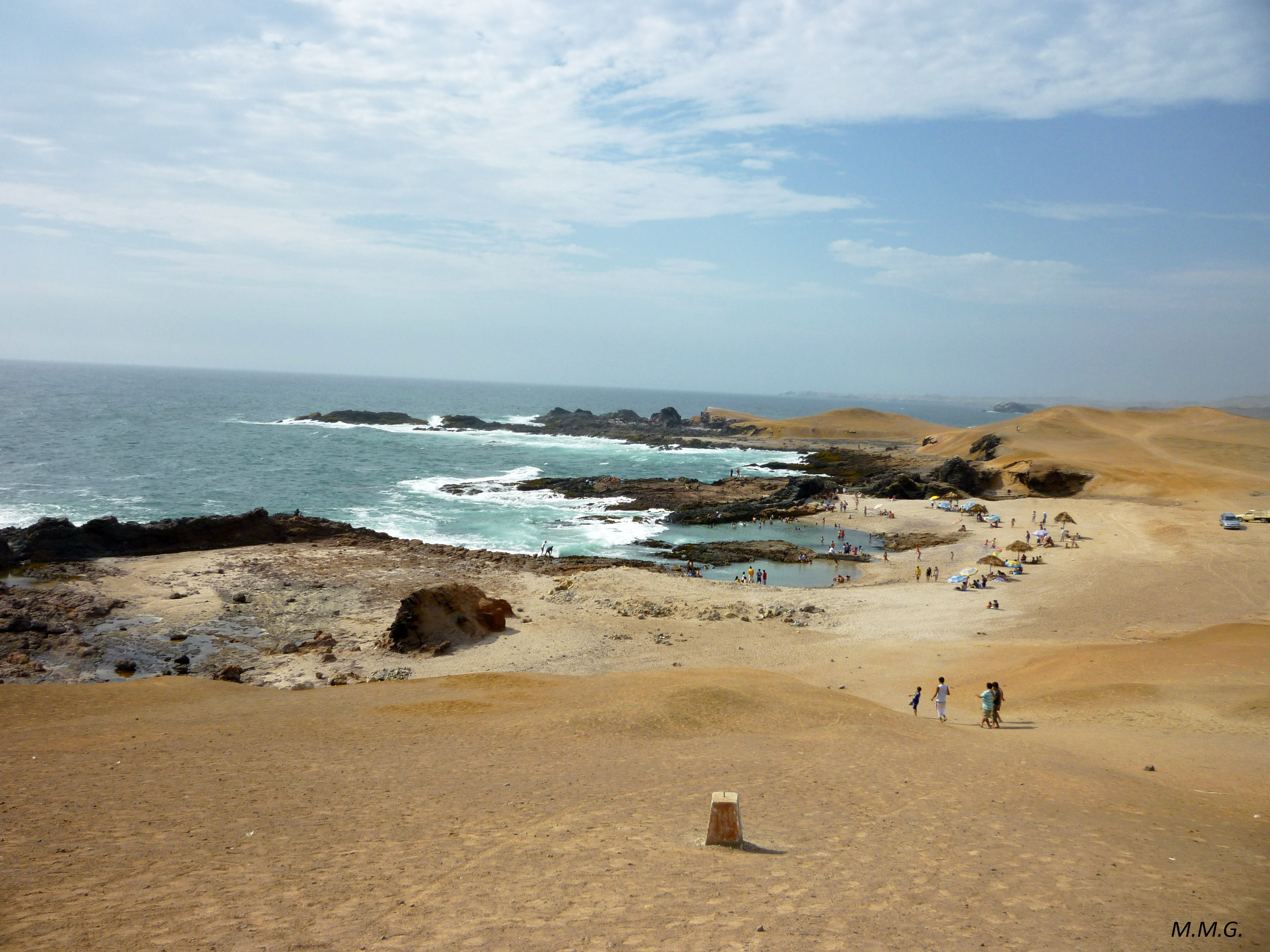 la pocita